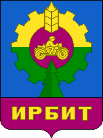 Герб Ирбита, Свердловская область